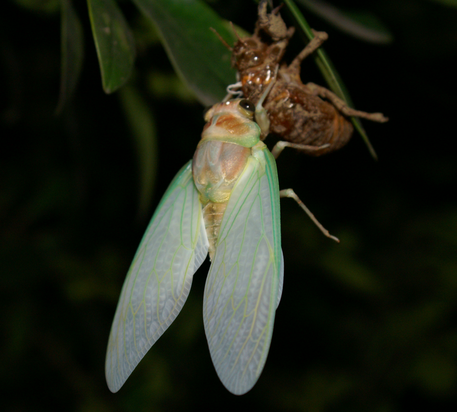 Emerging Graptopsaltria nigrofuscata